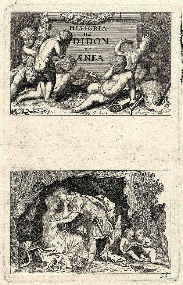 Historia de Didon et Aenea, Radierungen; um 1700